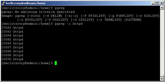 pgrep outpux example